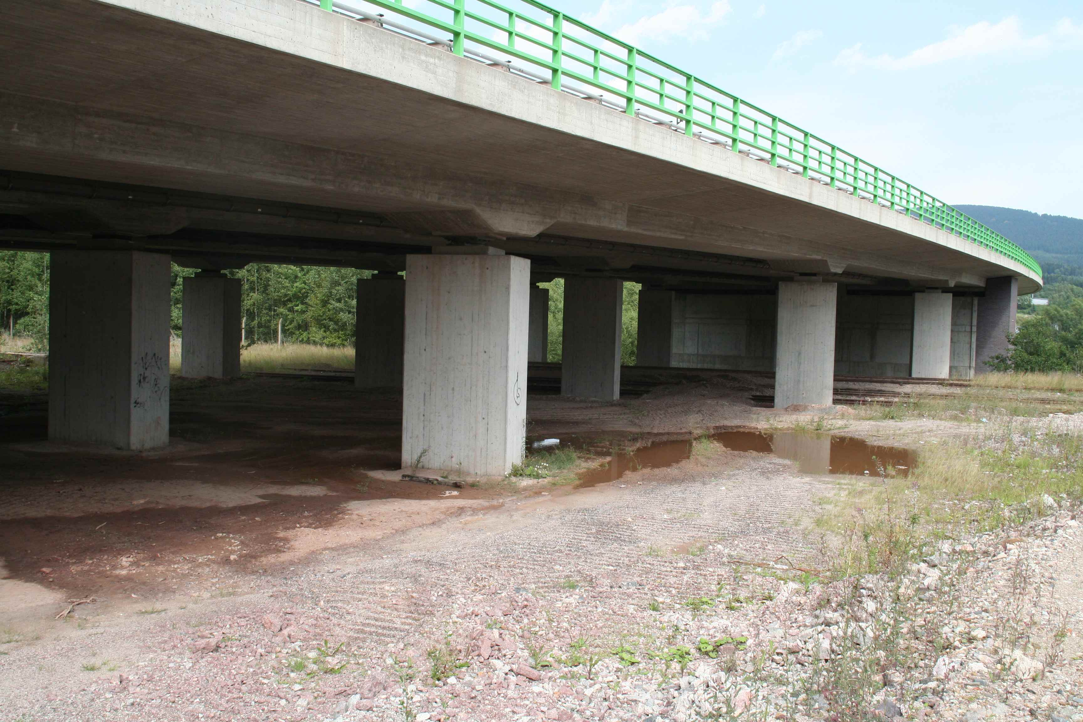 Talbrücke Steinatal (Industriebahnbrücke) Bundesautobahn A71 bei Suhl/Zella-Mehlis in Thüringen